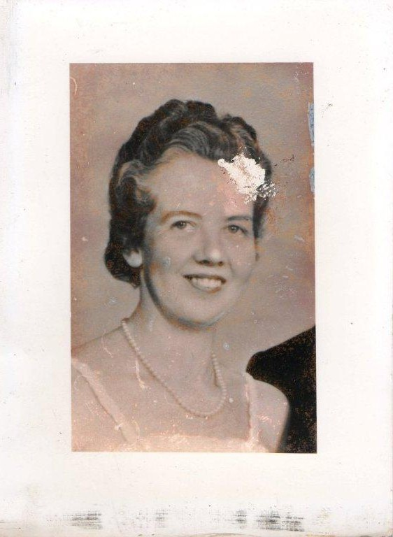 Solveig Klausen(18.08.07-13.01.89) Gift med Johan Klausen(22.08.09-nov.1979) Redaktør for V-posten, illegal avis i Drøbak.